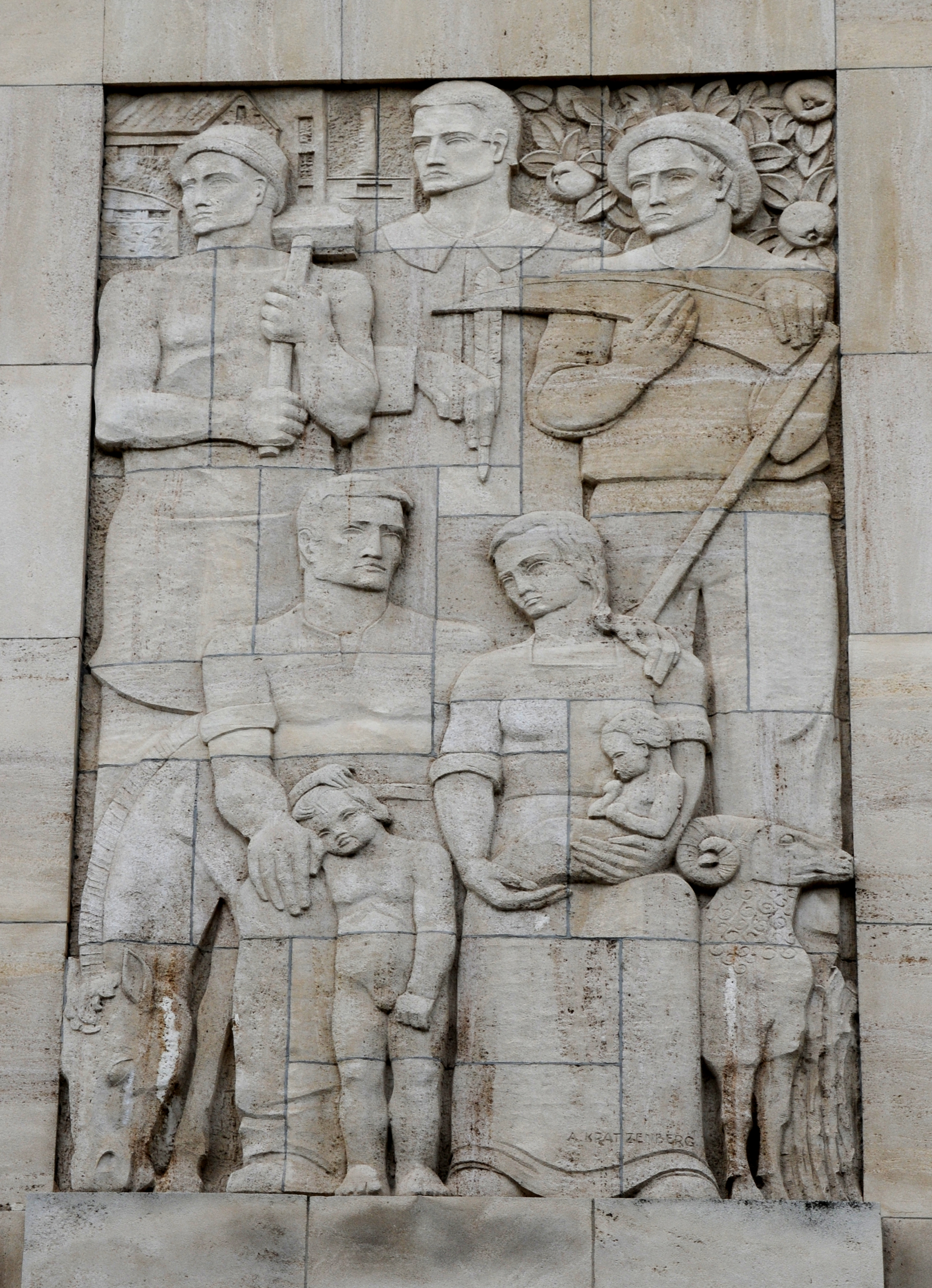 E Relief vum Albert Kratzenberg un der Fass vum tageblatt, 44 Kanalstrooss zu Esch.